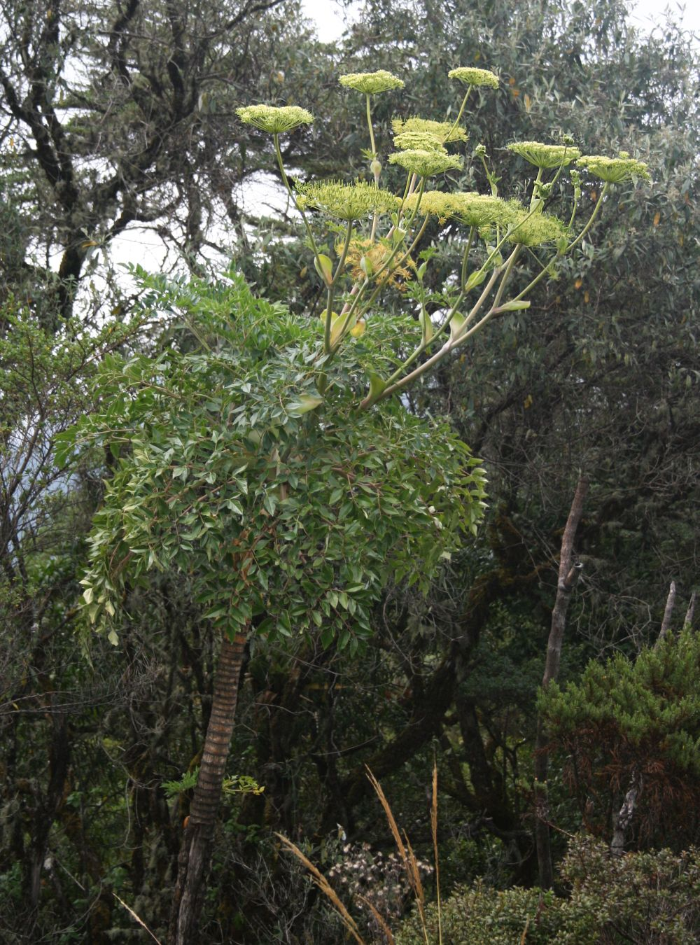 Myrrhidendron donnell-smithii, Doldenblütler (Apiaceae) - Costa Rica: Prov. Cartago/San José, Cordillera de Talamanca, Carretera Interamericana N Cerro de la Muerte, km 86-87, 3150-3200 m